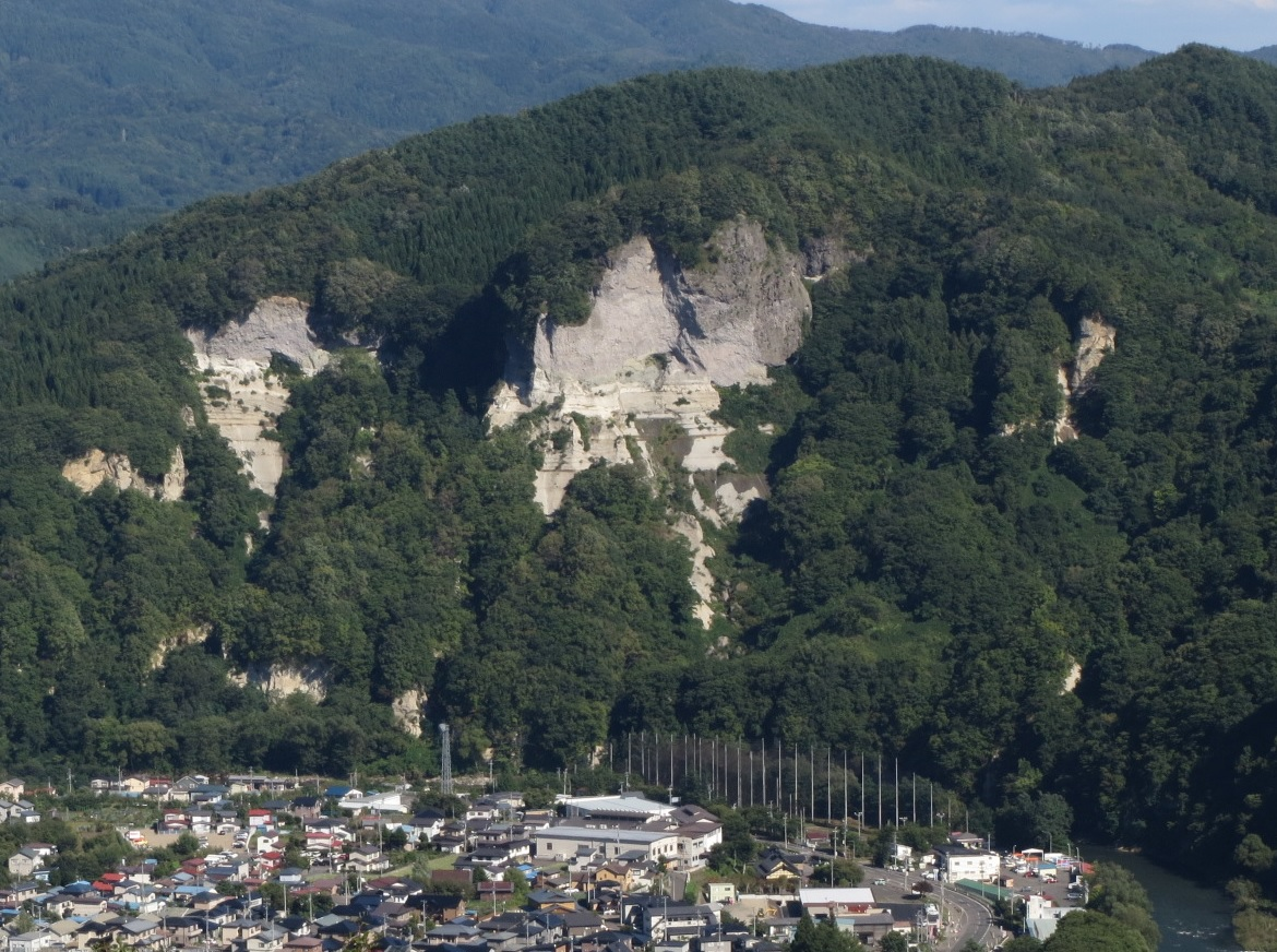 二戸市にある大崩崖